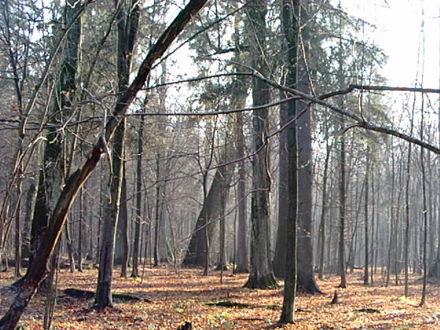 Pomniki przyrody w blasku październikowego słońca